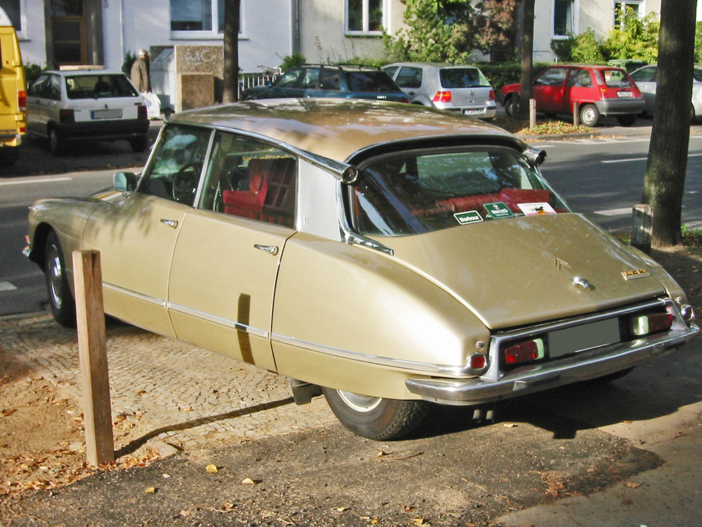 Citroen DS 21